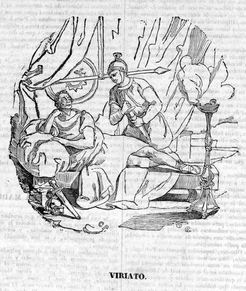 Viriato in Semanario pintoresco español